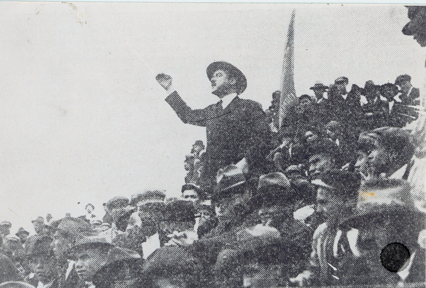 Manuel Joaquim de Sousa discursando num comício de 1º de maio, no Parque Eduardo VII, em Lisboa.